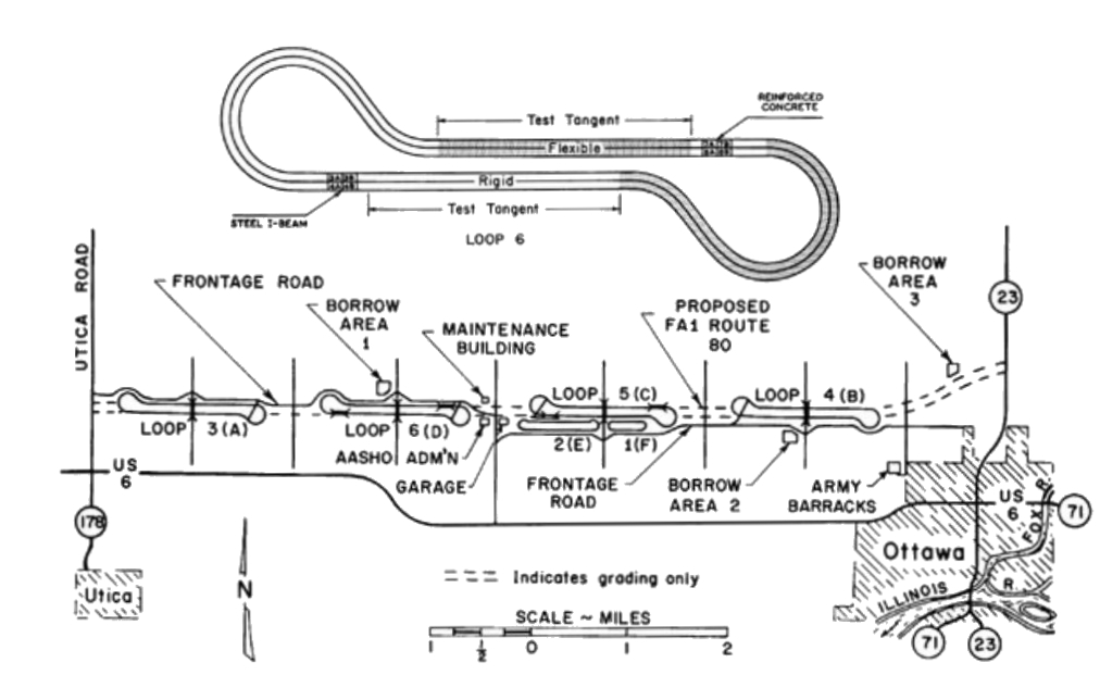 Schematische Darstellung der Rundkurse des AASHO Road Test und deren Lage bei Ottawa